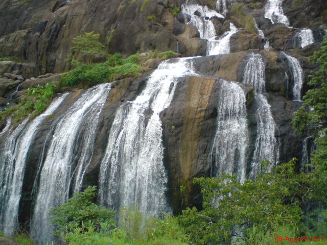 മരോട്ടിച്ചാൽ വെള്ളച്ചാട്ടം